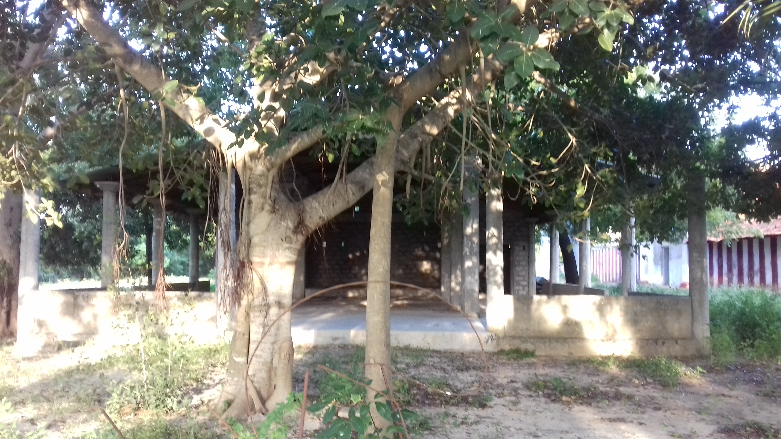 அராலி ஸ்ரீ விசாலாக்ஷி சமேத விஸ்வநாதேஸ்வரர் தேவஸ்தானம்